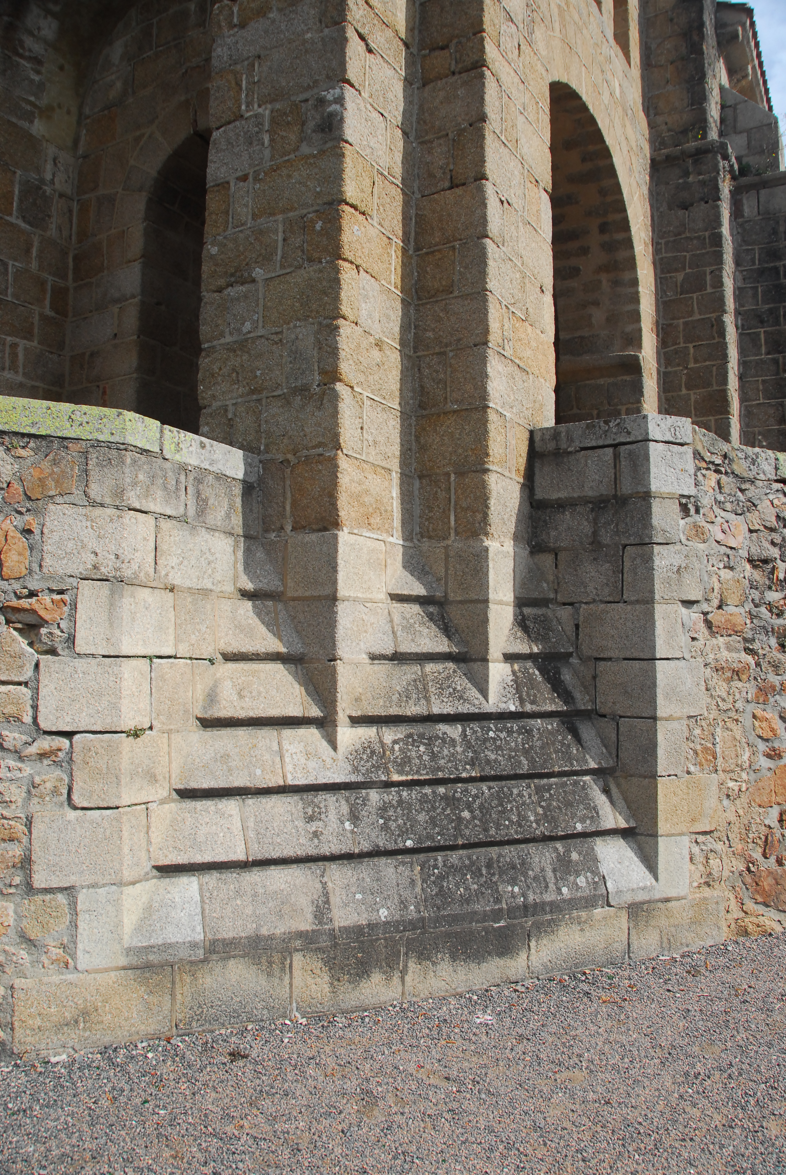 N.-D. de Châtel-Montagne, Portalvorbau, Fassade, SW-Ecke